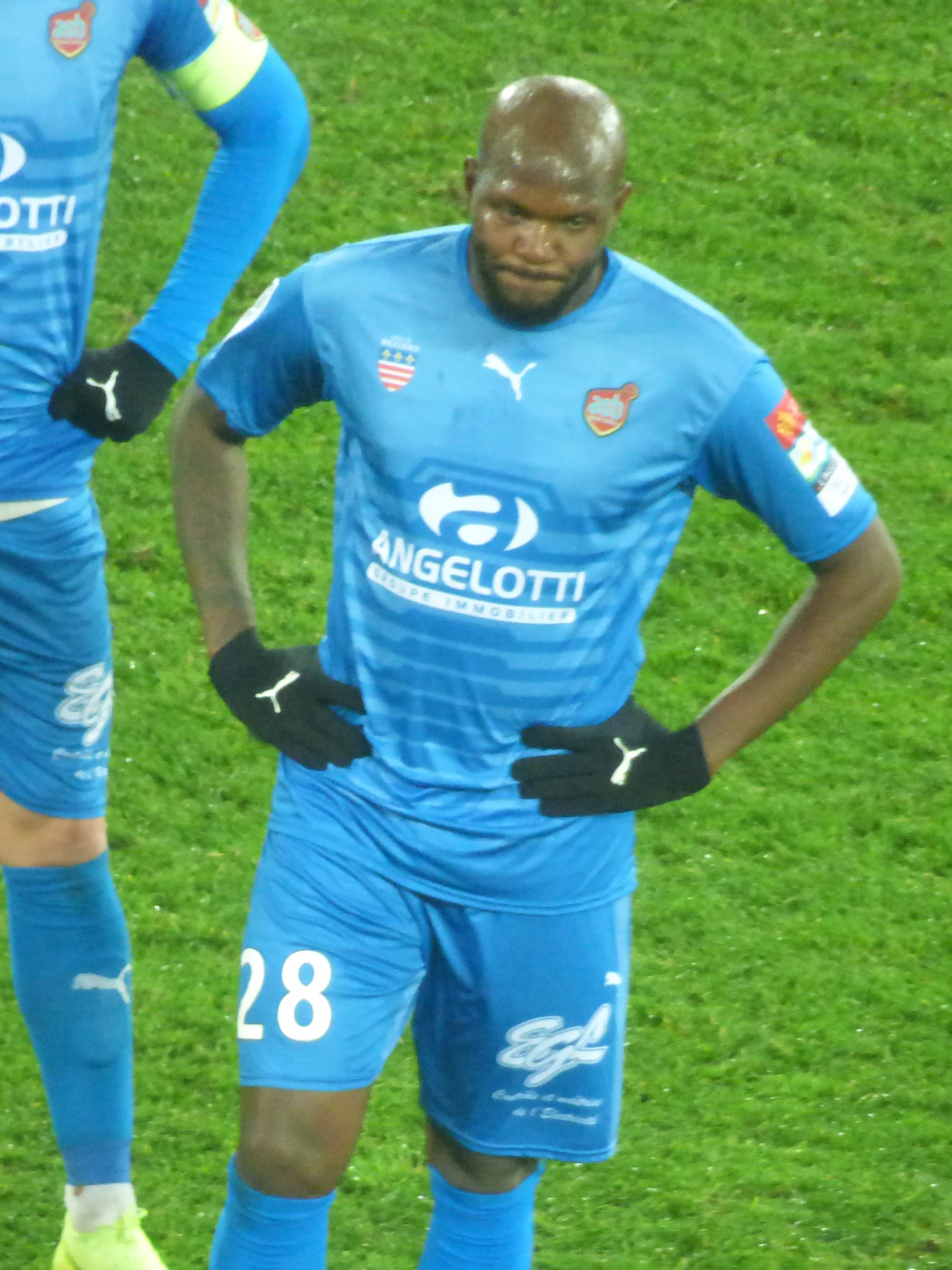 Julien Cétout pendant le match RC Lens / AS Béziers, comptant pour la 23ème journée du championnat de France de football de Ligue 2 2018-2019, le 4 février 2019, au Stade Bollaert-Delelis.